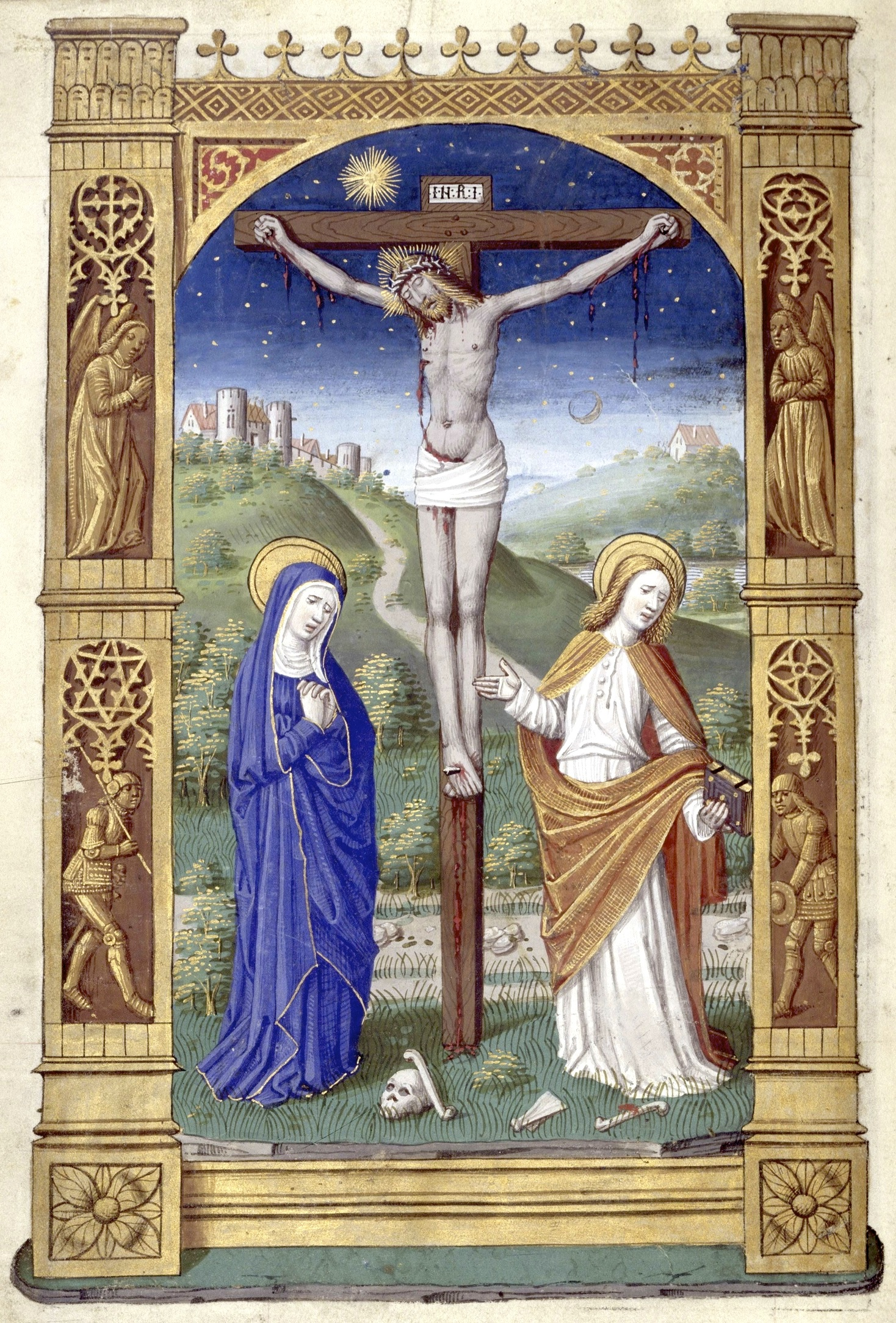 Heures de Charles VIII fol. 111V Crucifixion